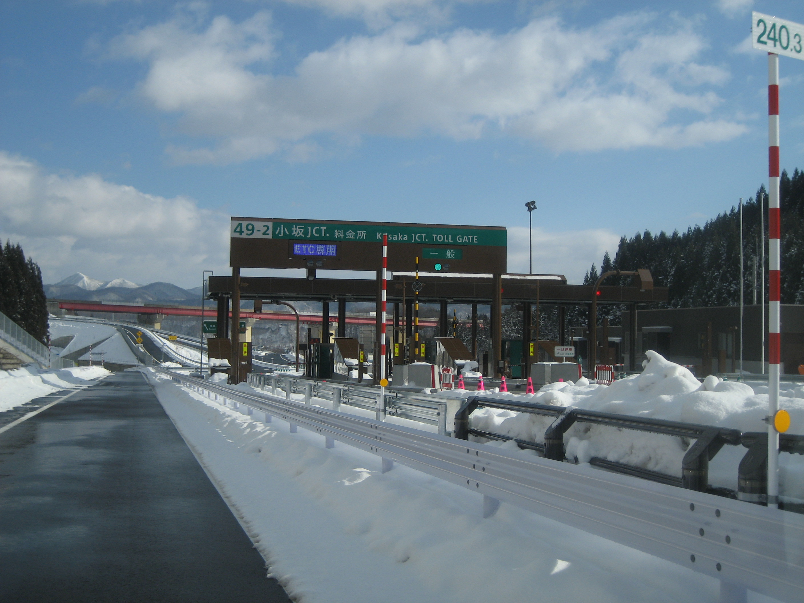 秋田自動車道小坂JCT料金所